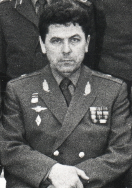 Командующий Дальней авиацией ВВС СССР генерал-майор Пётр Степанович Дейнекин с группой офицеров и солдат в штабе Дальней авиации СССР